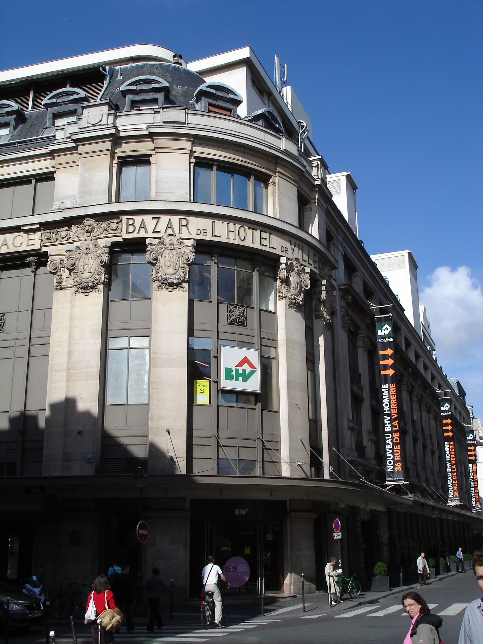 BHV (Bazar dde l'Hôtel de Ville in Paris, view from rue des Archives